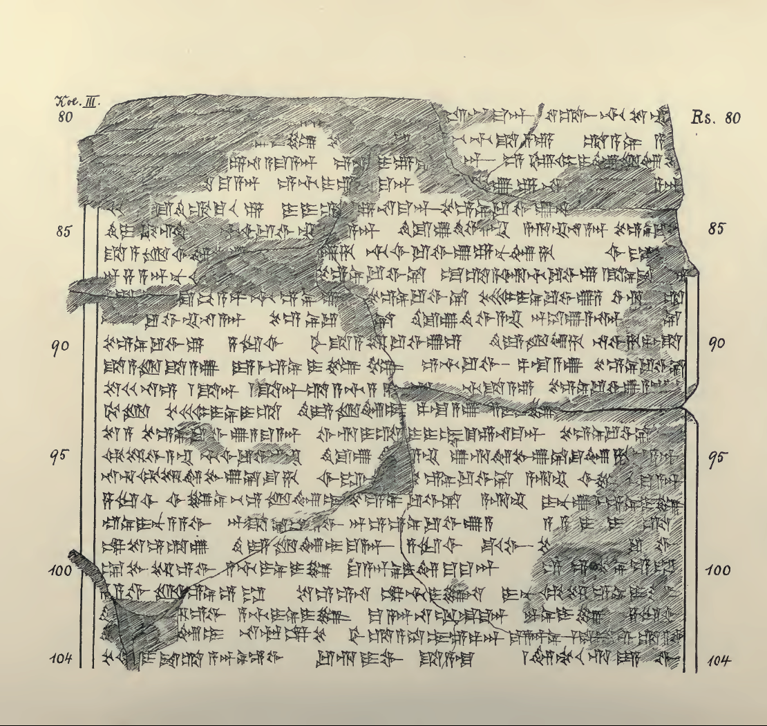 List Tuszratty do Amenhotepa III w języku huryckim – autografia.